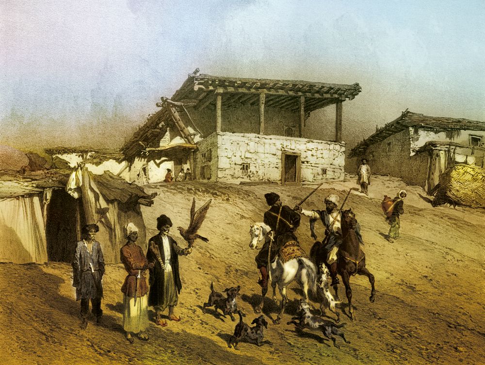 Daghestan. Mosquee de Yarag.